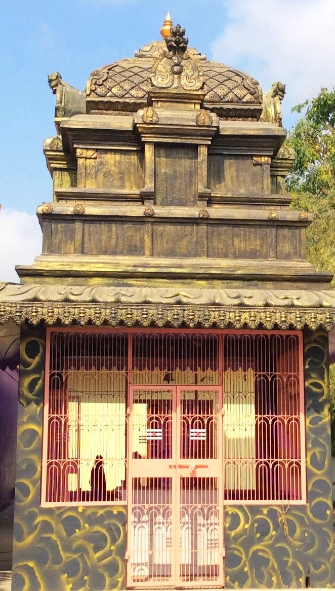 నవగ్రహాల మండపం.